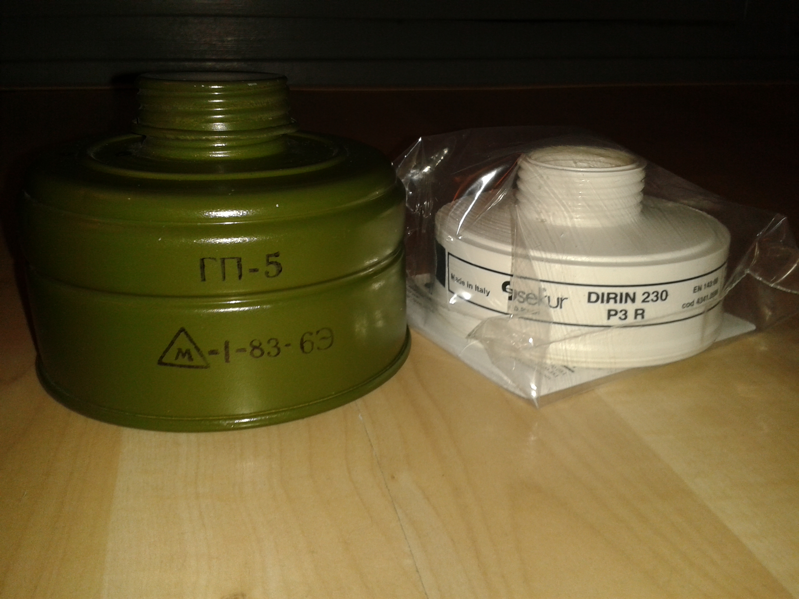 Ein GP-5 Gasmaskenfilter im vergleich zu einem modernen Partikelfilter ( Schutzstufe P3 )